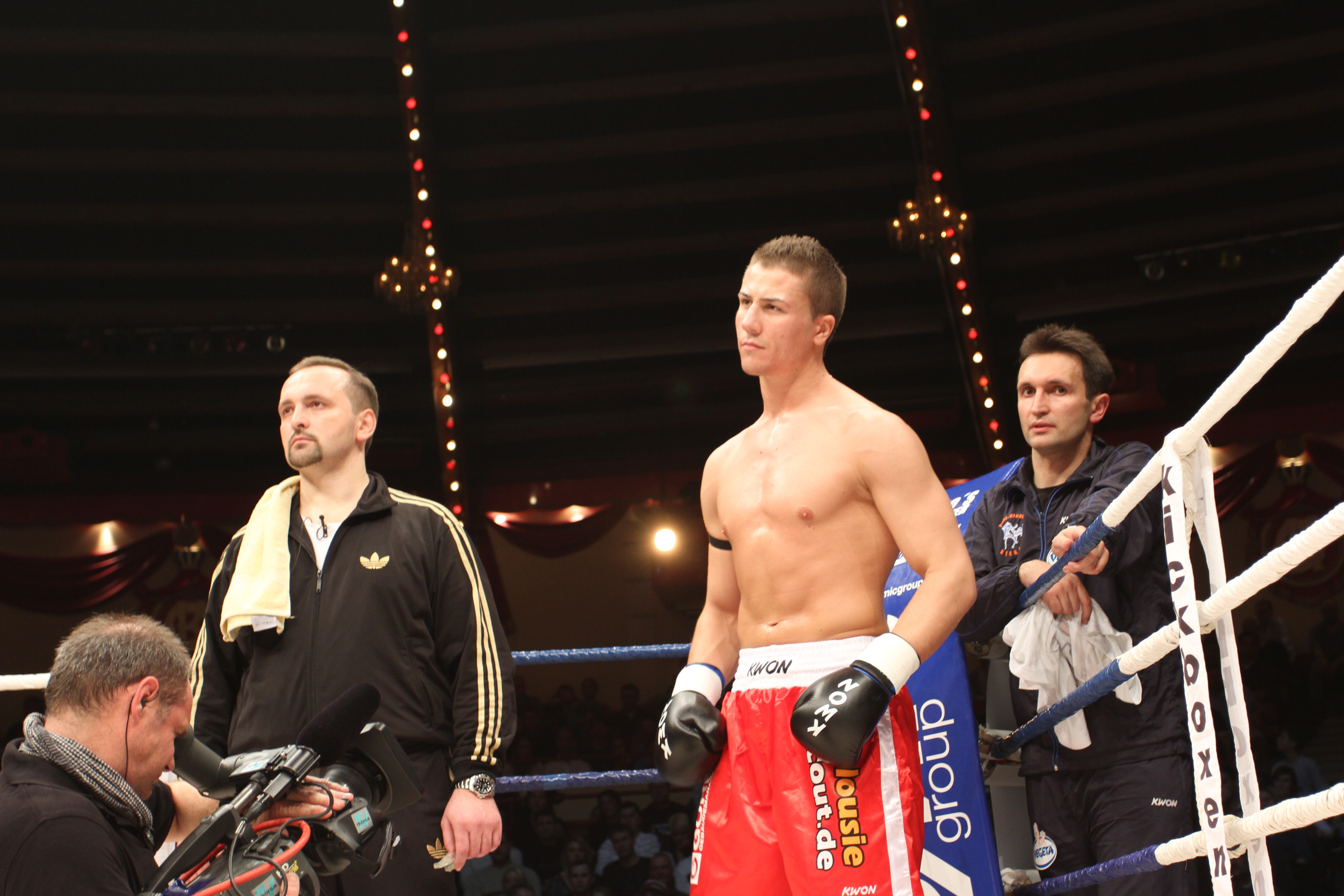 Pavlica Steko (links) mit dem WKA-Weltmeister Florian Pavic und Mladen Steko (rechts)